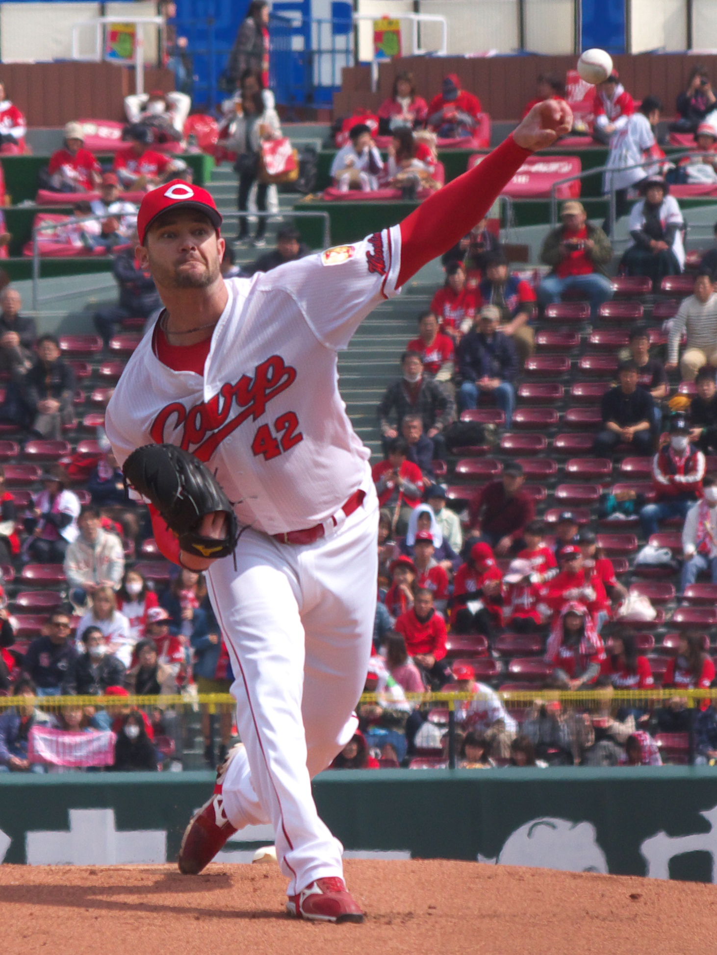 広島東洋カープクリス・ジョンソン